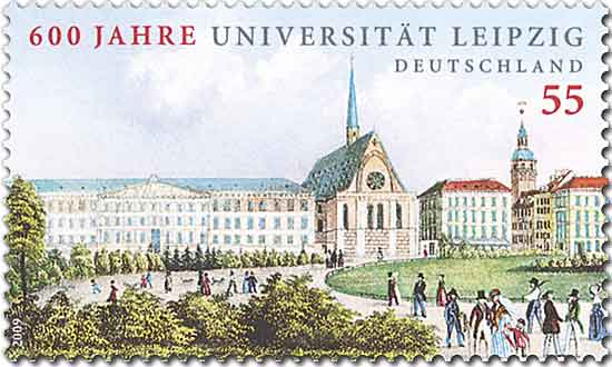 Briefmarke der Deutschen Post AG, 600 Jahre Universität Leipzig